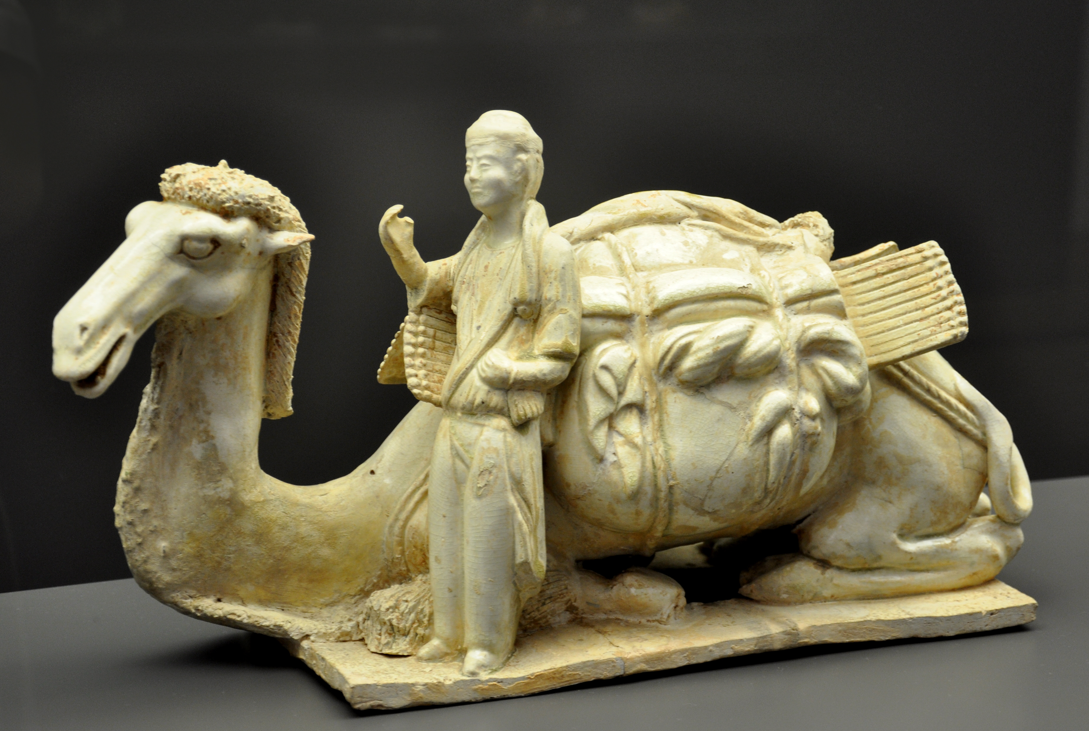 Liegendes Kamel mit Führer, Tang-Dynastie, frühes 7. Jahrhundert, glasiertes Steinzeug Museum Rietberg, Zürich; Inv. Nr. RCH 516